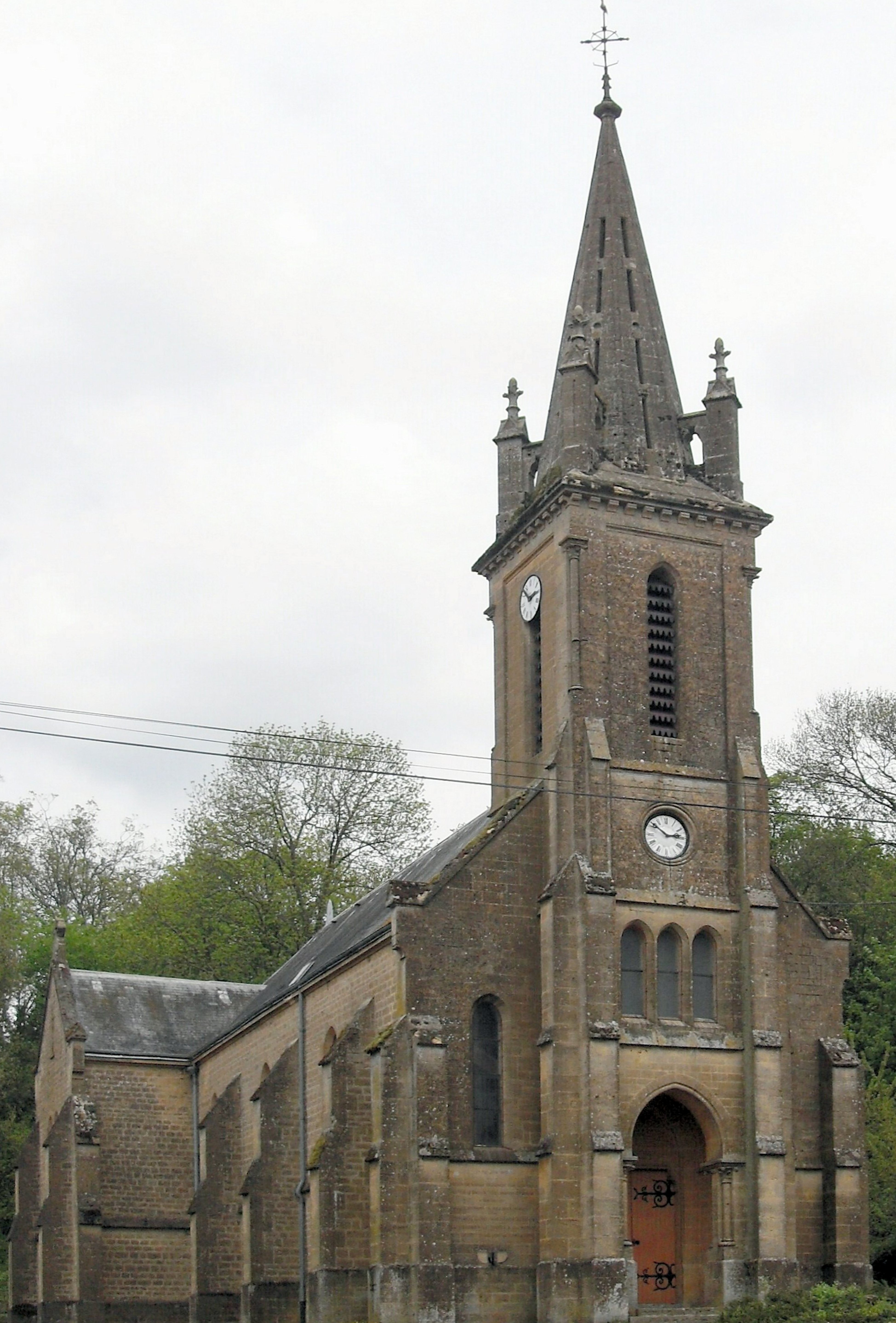 L*église Saint-Joseph de Cervisy à Stenay